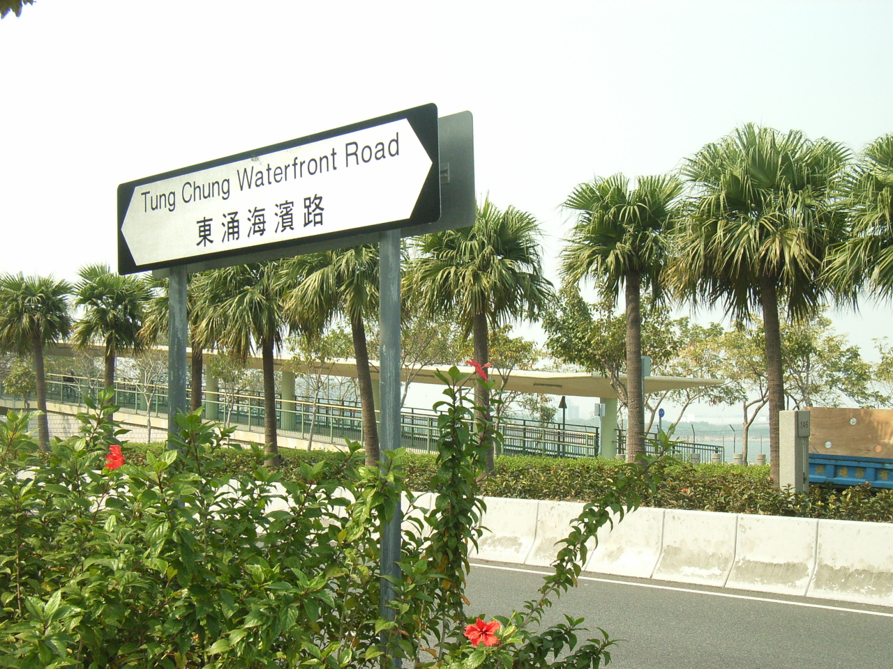 東涌海濱路 (Tung Chung Waterfront Road)，是zh:香港zh:離島zh:大嶼山北部沿海的一條zh:街道，主要是行車道，前身是新zh:填海區。 東涌海濱路東至zh:迎禧路，西至zh:順東路及赤臘角南路交匯處。 東涌海濱路之中途，經過zh:北大嶼山快速公路行車zh:天橋、東涌發展碼頭、渡輪碼頭旁之zh:的士站、巴士站、海堤灣畔第三期、惠東路及zh:行人天橋及zh:怡東路止。 Photographic and author: User:TUNGTUNG360